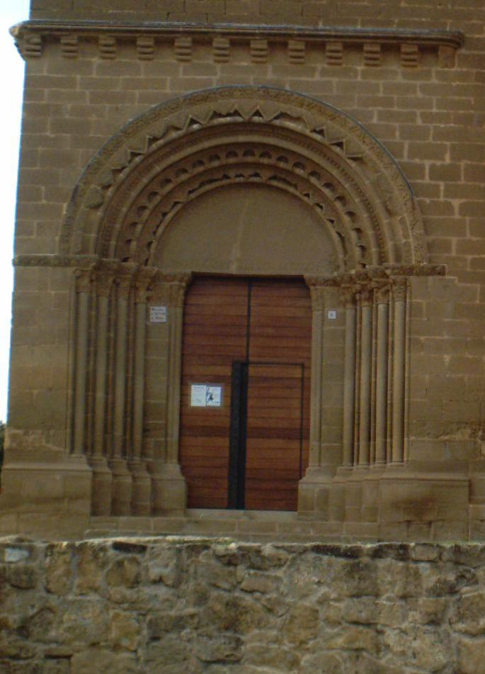 Portada de la ermita de San Miguel de Foces en Ibieca (Huesca)